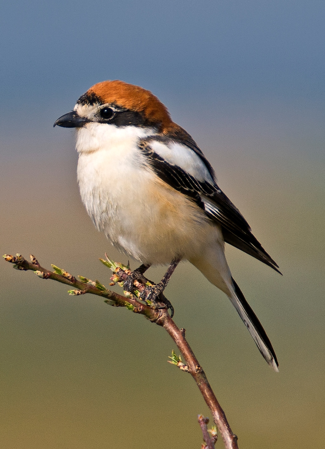 Sigma 120-300 2,8 + TCx1.4